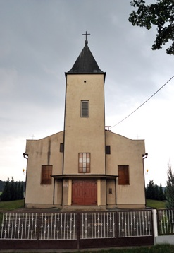 Kościół św. Anny w Wąsicach